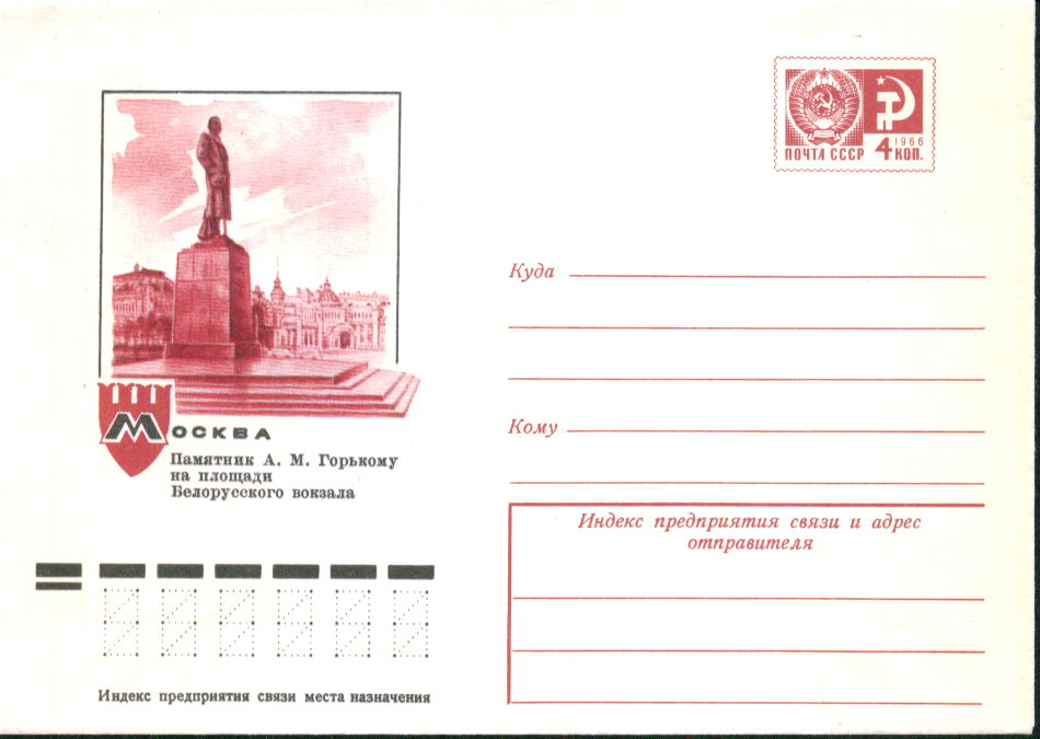 Москва. Памятник Горькому у Белорусского вокзала, почтовый конверт